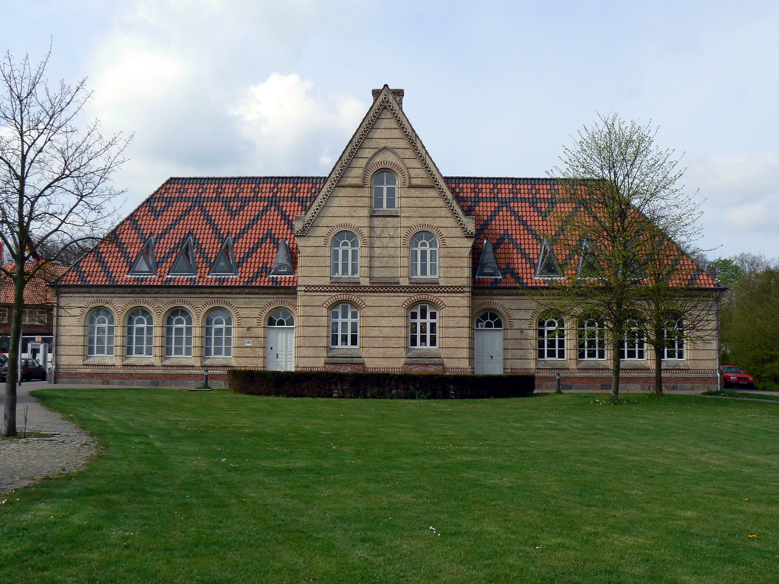 Das Rathaus von Kappeln.